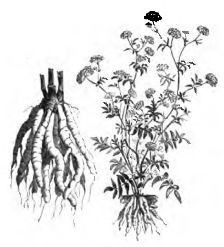 Les plantes potagères. Description et culture des principaux légumes des climats tempérés, 1re édition, ouvrage publié par la maison Vilmorin-Andrieux & Cie à Paris en 1883.